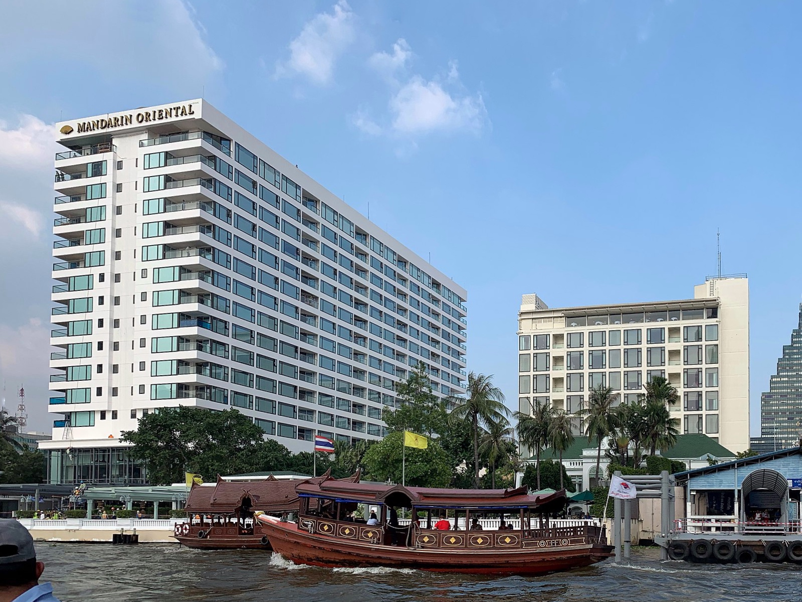 โรงแรมโอเรียนเต็ล